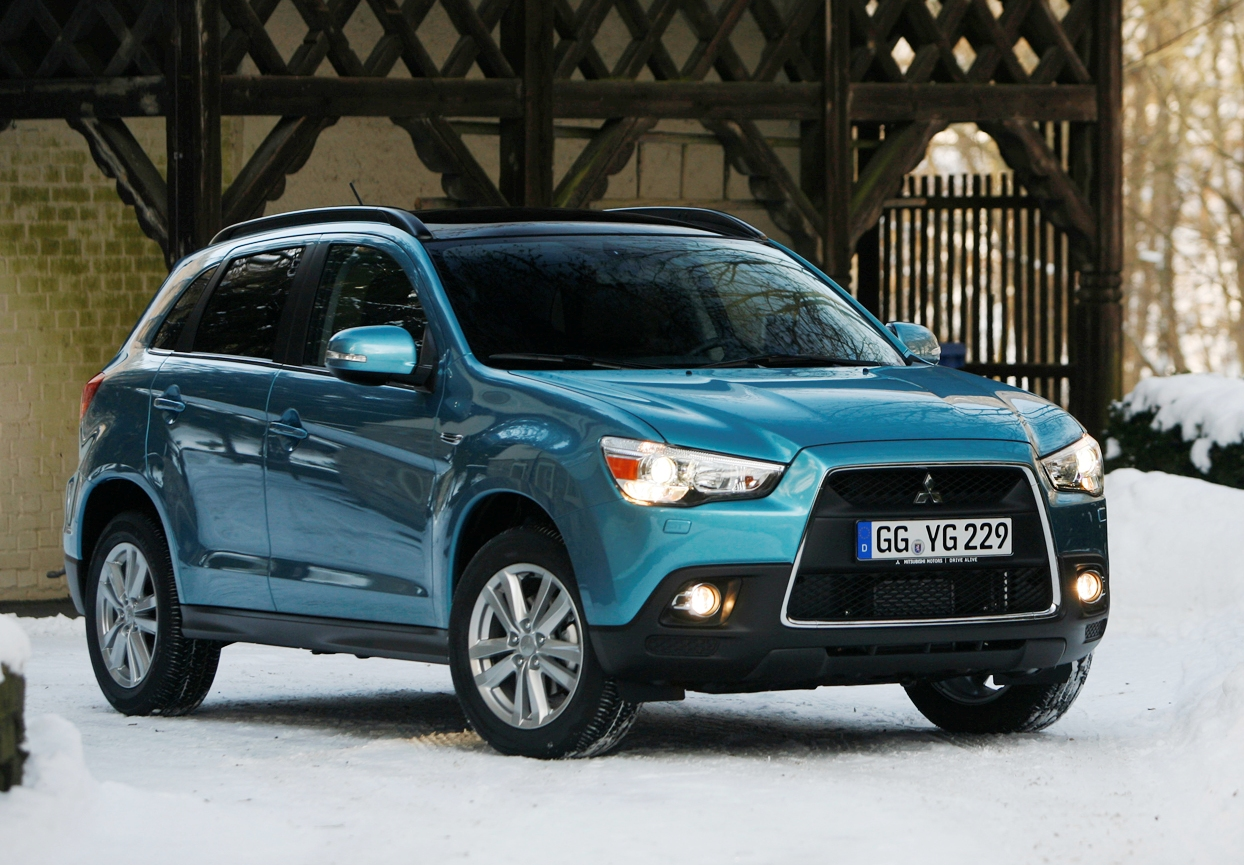 Fotoaufnahme Mitsubishi ASX